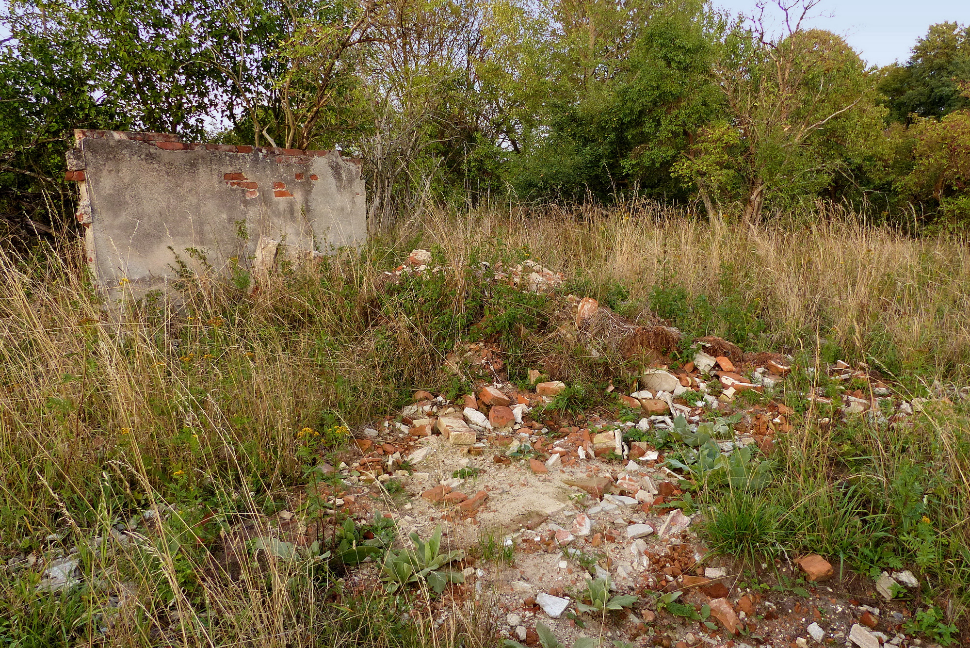 Trosky domu v bývalých Kostřicích